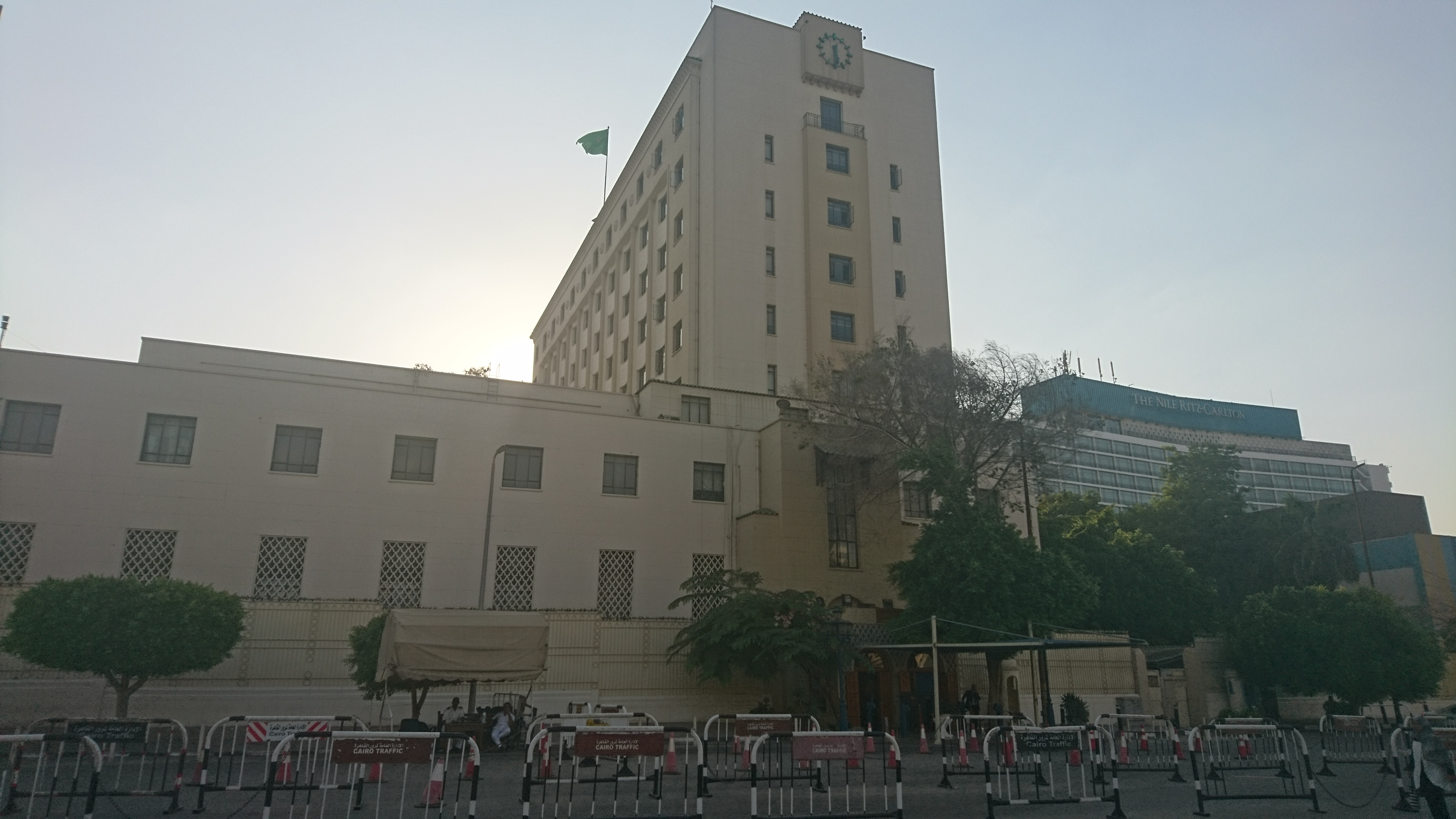 مقر جامعة الدول العربية بالقاهرة